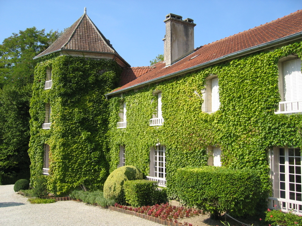 La Boisserie - Résidence du général de Gaulle à Colombey-les-deux-églises